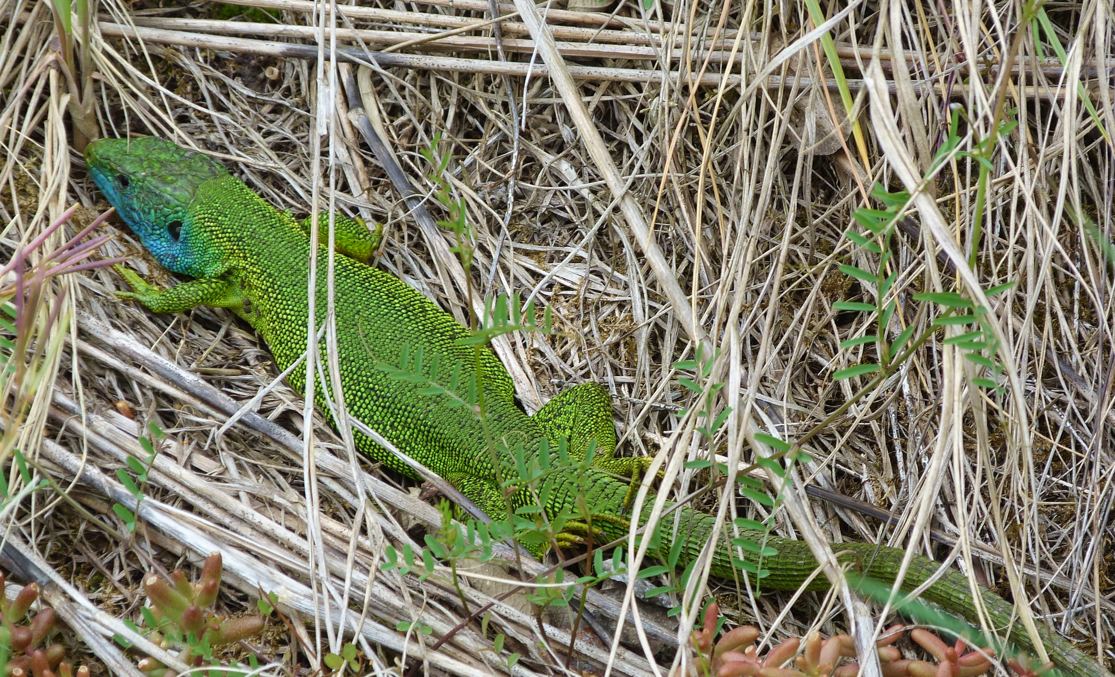 FFH Fellerbachtal (6206-301): Smaragdeidechse – Das Foto wurde im Fellerbachtal (Nähe Cochem / Mosel) aufgenommen. Es handelt sich hier um ein männliches Exemplar.